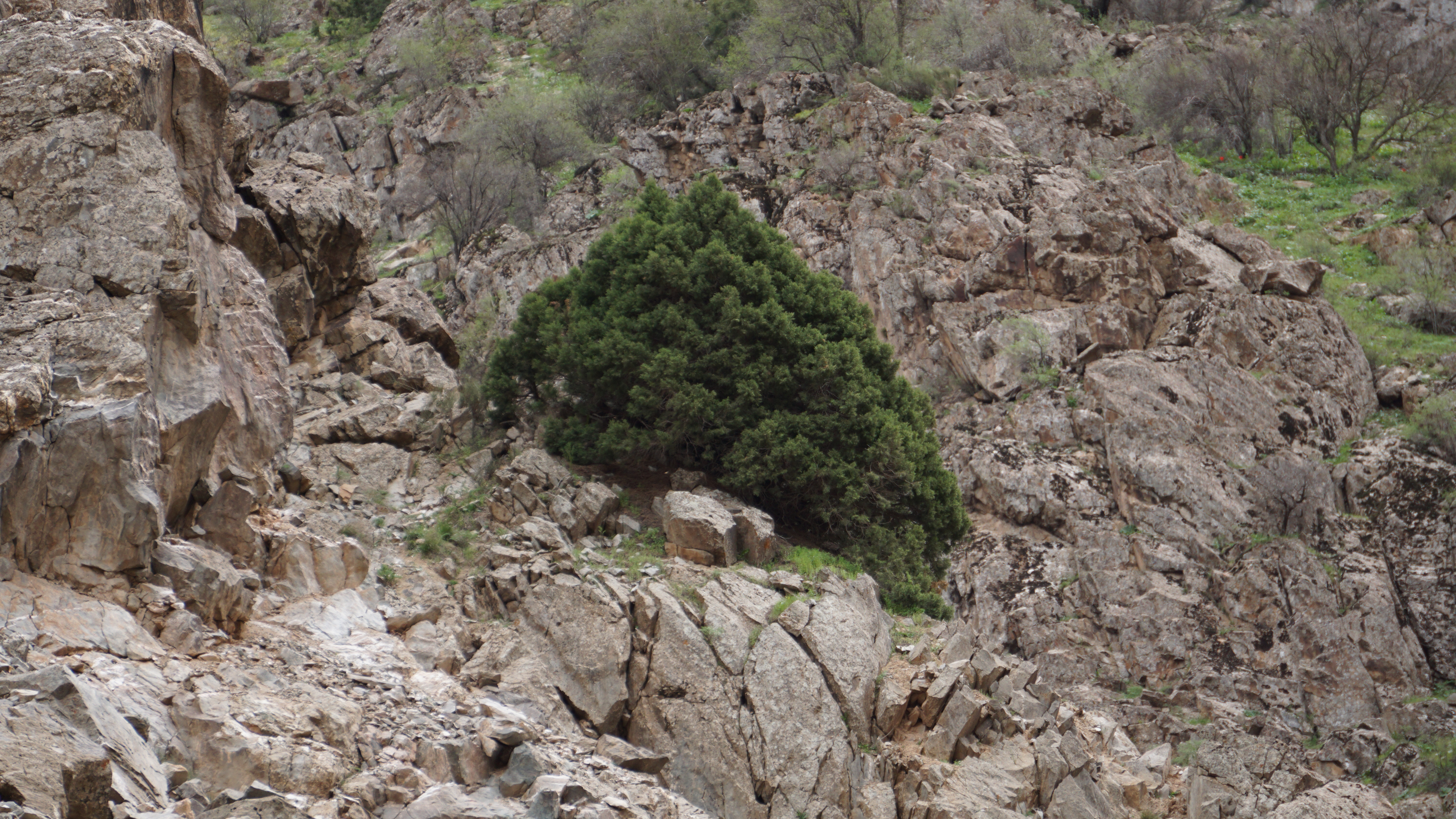 Арча на склоне